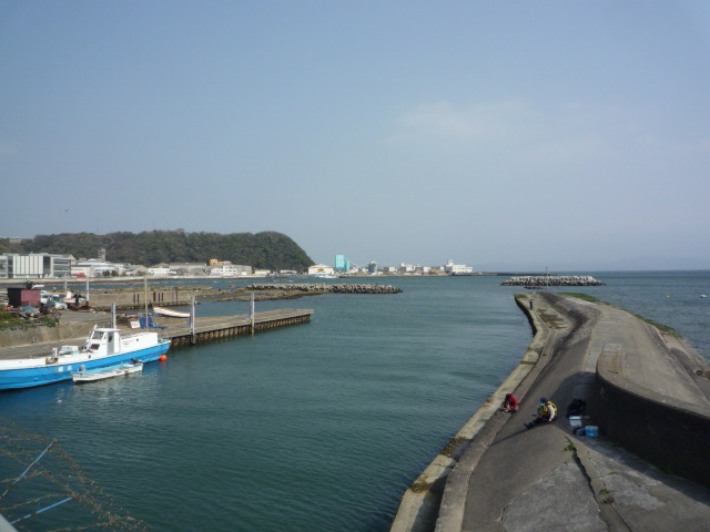 開国橋から平作川河口を撮影。